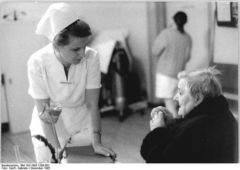 Berlin, Krankenhaus Friedrichshain, Stationsschwester ADN-ZB Senft 6.12.85 Berlin: Schwester Irmgard- Nicht nur für den organisatorischen Ablauf und die Anleitung der Schwestern ist Stationsschwester Irmgard Dückert verantwortlich - sie nimmt sich auch Zeit für die Patienten. Wenn sich eine der Frauen mit persönlichen Sorgen an sie wendet, hilft die Schwester, wo sie kann. Dabei handelt es sich oft um die Unterbringung kleiner Kinder oder die Betreuung alleingebliebener älterer Ehepartner während des Krankenhausaufenthaltes der Angehörigen. In solchen fällen arbeitet die Schwester mit der Fürsorge zusammen. Die 38jährige Irmgard Dückert ist auf Station 11 der Frauenklinik im Krankenhaus Friedrichshain tätig. Bestimmte Arbeiten erledigt die Stationsschwester allein oder gemeinsam mit anderen Schwestern, um in Kontakt mit den Patienten zu sein. Ihr liegt daran die Kranken zu sehen, mit ihnen zu sprechen, über ihr Befinden informiert zu sein.